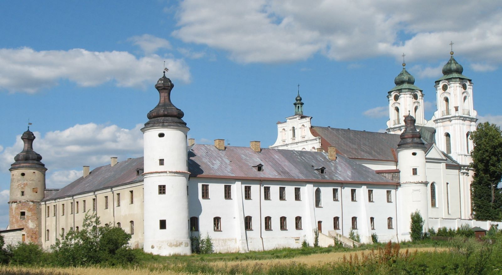 Sejny (Poland), monastery